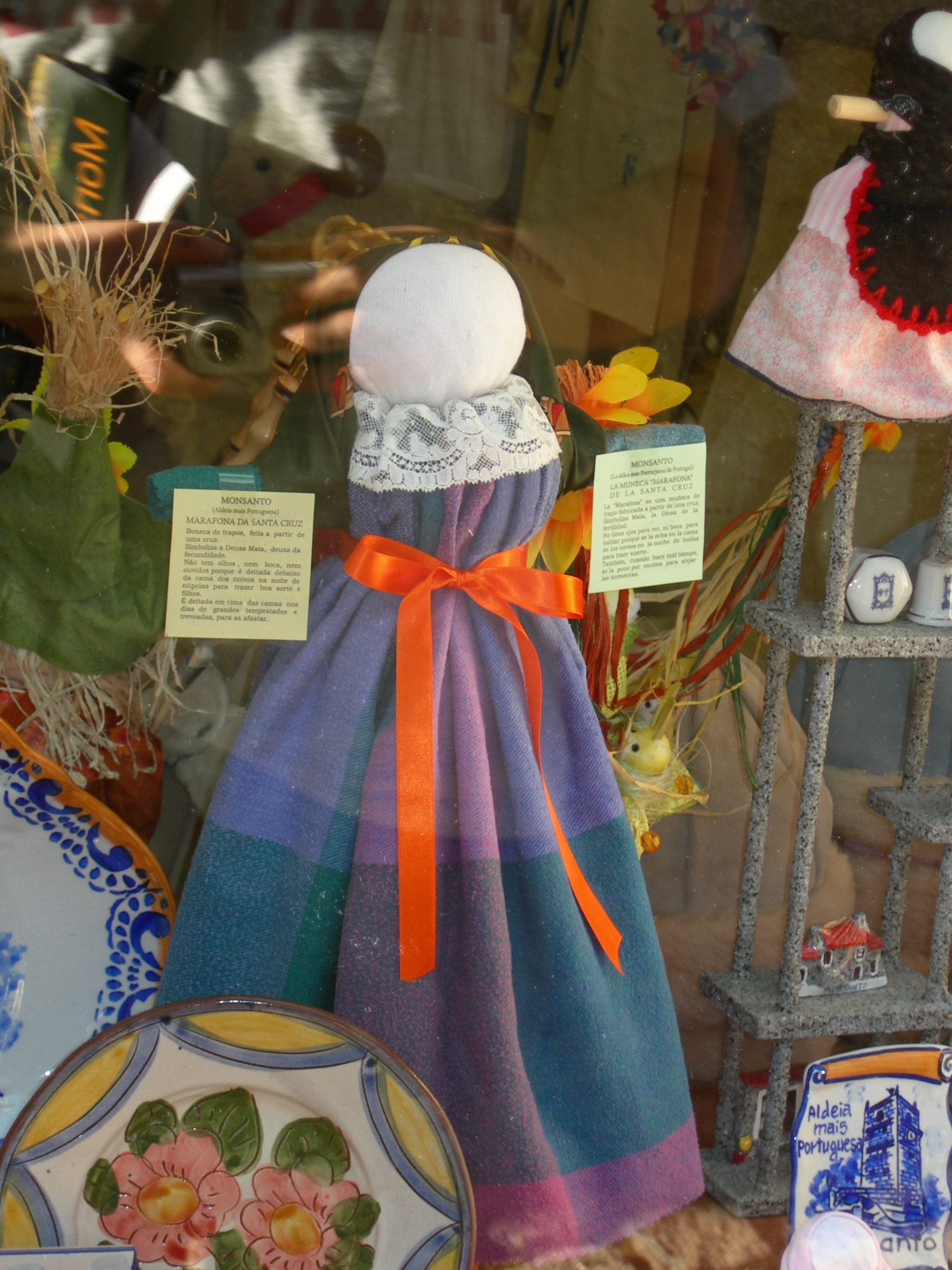 A marafona, a boneca tipica de Monsanto This monument is classified as Imóvel de Interesse Público. This file was uploaded for Wiki Loves Monuments in Portugal with the unique identifier 74233.